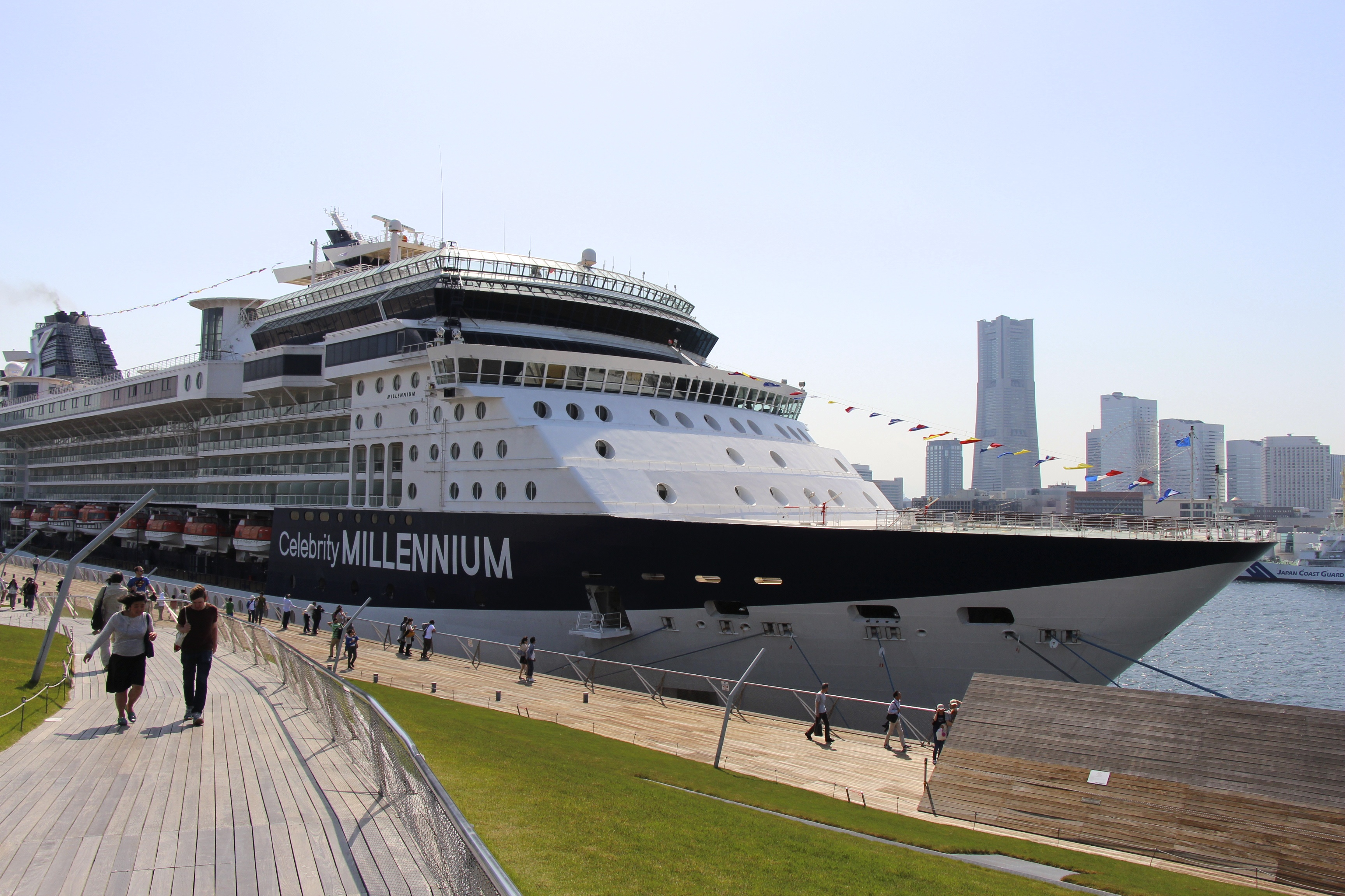 大桟橋（客船入港中）